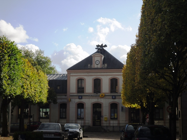 L'hôtel de Poste du centre-ville à Gif-sur-Yvette (91)